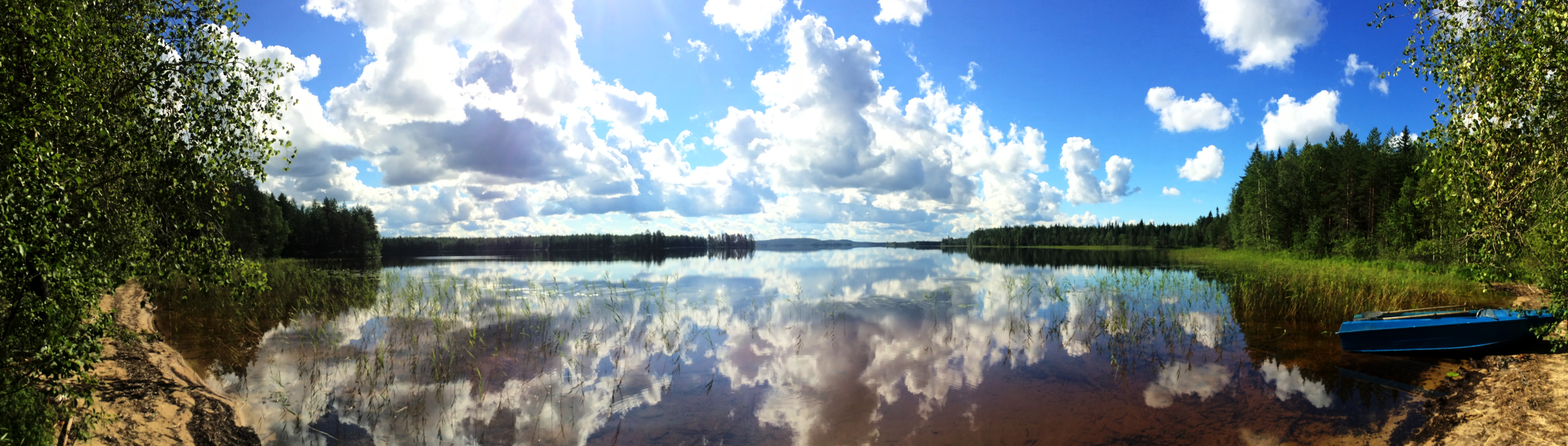 Воттозеро